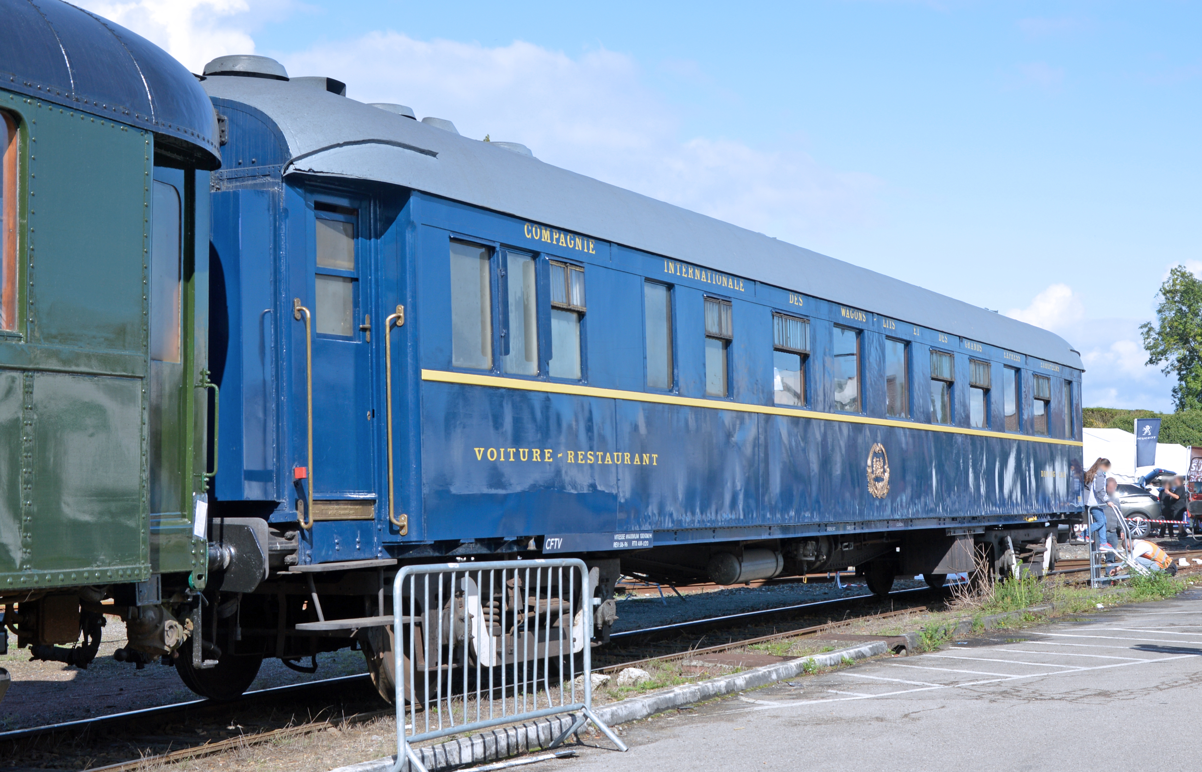 Voiture-restaurant n° 3585 CIWL